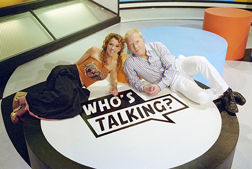 Setfoto's van Who's talking?: Tatum Dagelet en Danny Rook